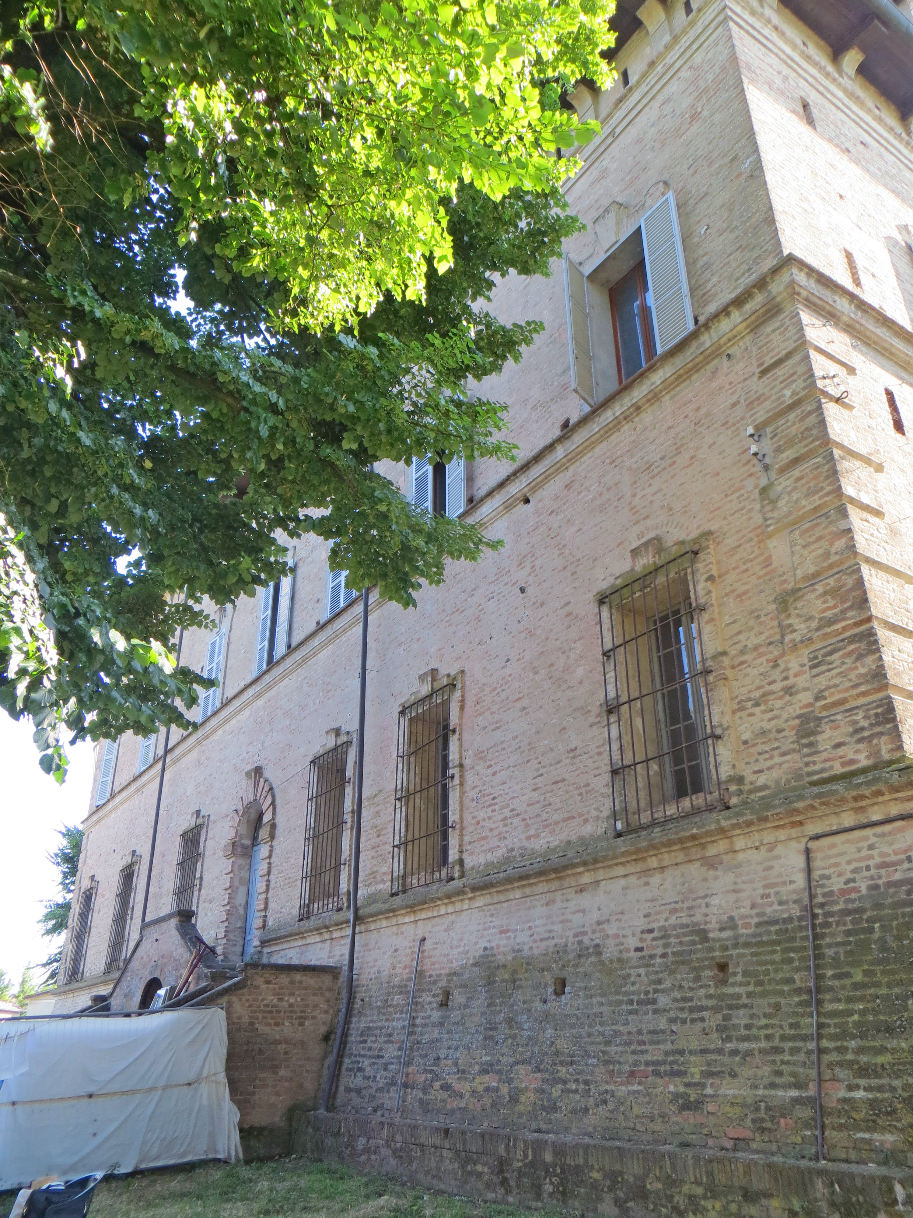 Rocca dei Terzi (Sissa) - lato est